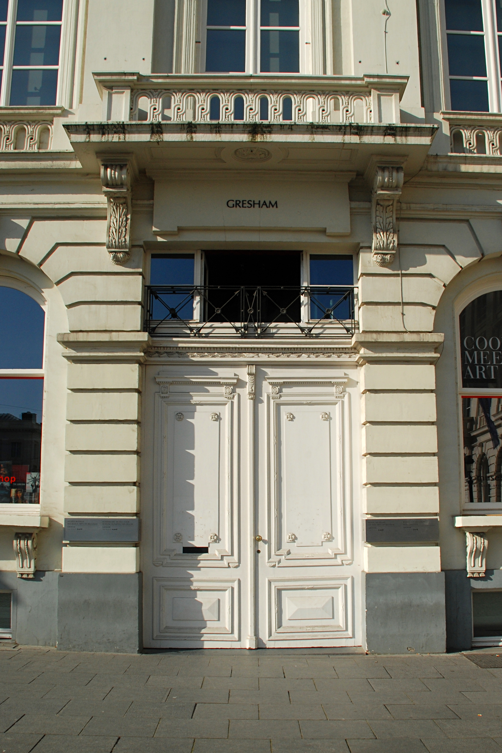 Belgique - Bruxelles - Hôtel des Brasseurs